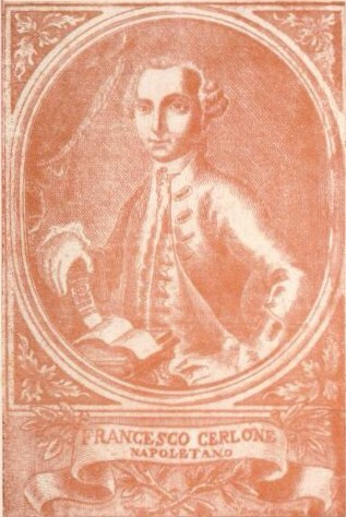 Francesco Cerlone, drammaturgo italiano (XVIII sec.)